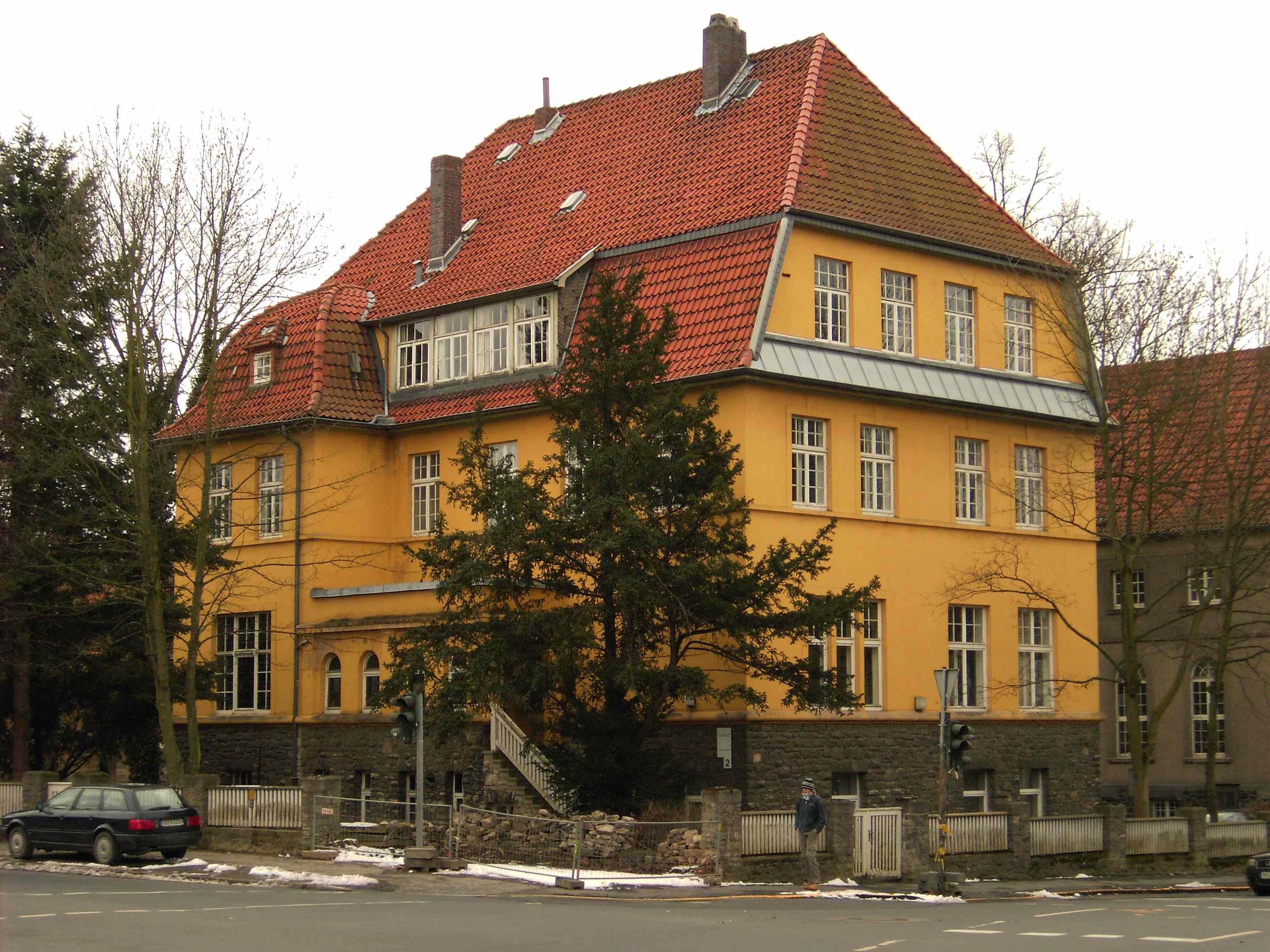 Göttingen, former building of Enzyklopädie des Märchens.